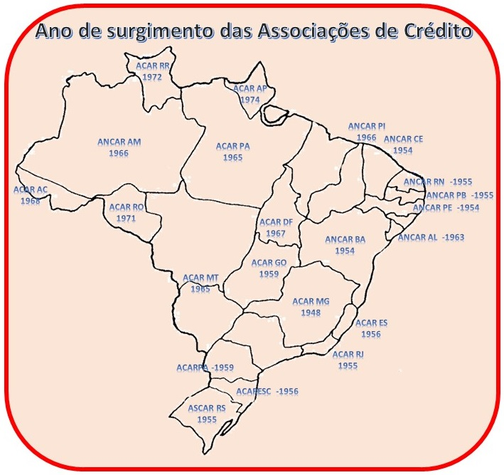 Ano de Criação das Associações de Crédito, precursoras das EMATERs e órgãos similares no Brasil